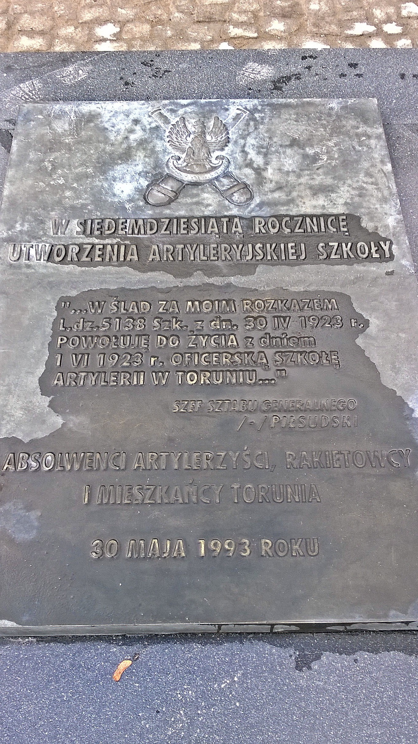 Tablica upamiętniająca 70 lat istnienia w Toruniu Oficerskiej Szkoły Artylerii